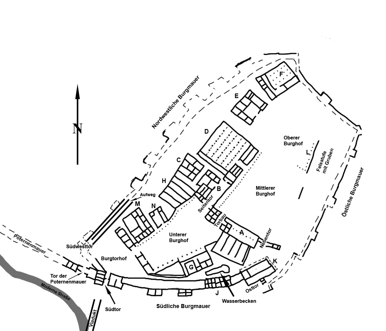 Plan der Königsburg Büyükkale in der hethitischen Hauptstadt Ḫattuša in der Zentraltürkei